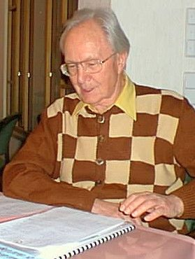 Friedrich Löchner, Schachweltmeisterschaft der Senioren 1997 in Bad Wildbad.